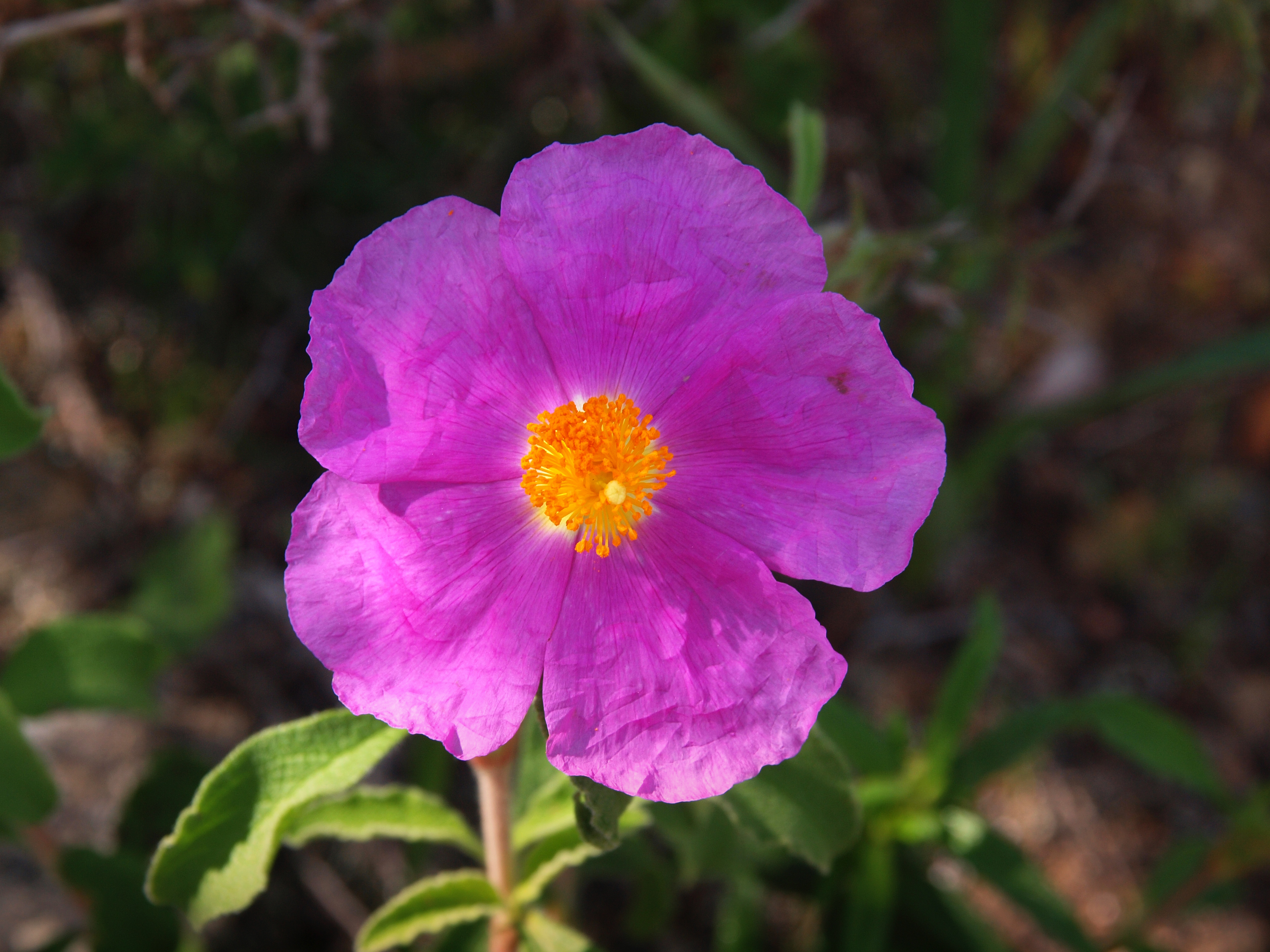 Santo-Pietro-di-Tenda, Nebbio (Corse) - Fleur de ciste de Crête dans le désert des Agriates